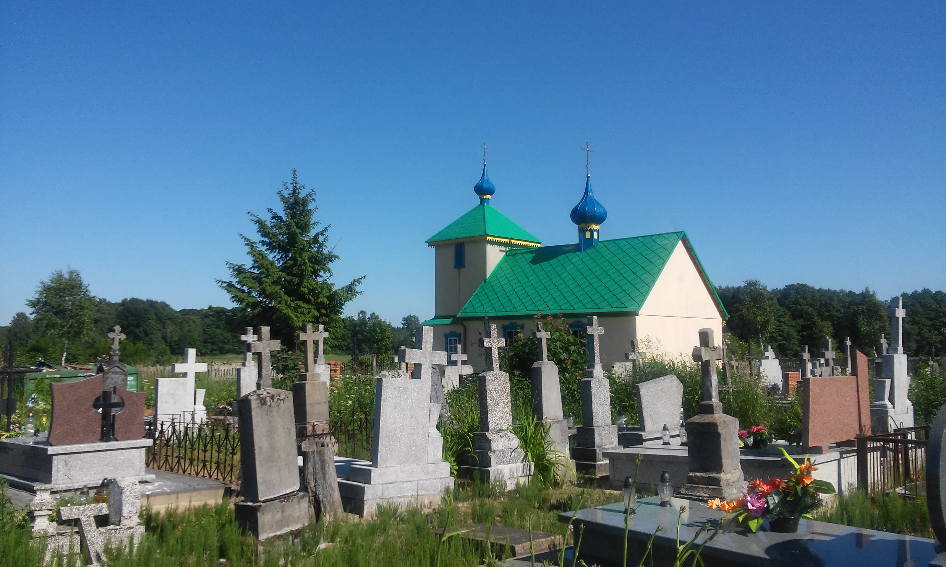 Cerkiew i cmentarz prawosławny w Kodeńcu